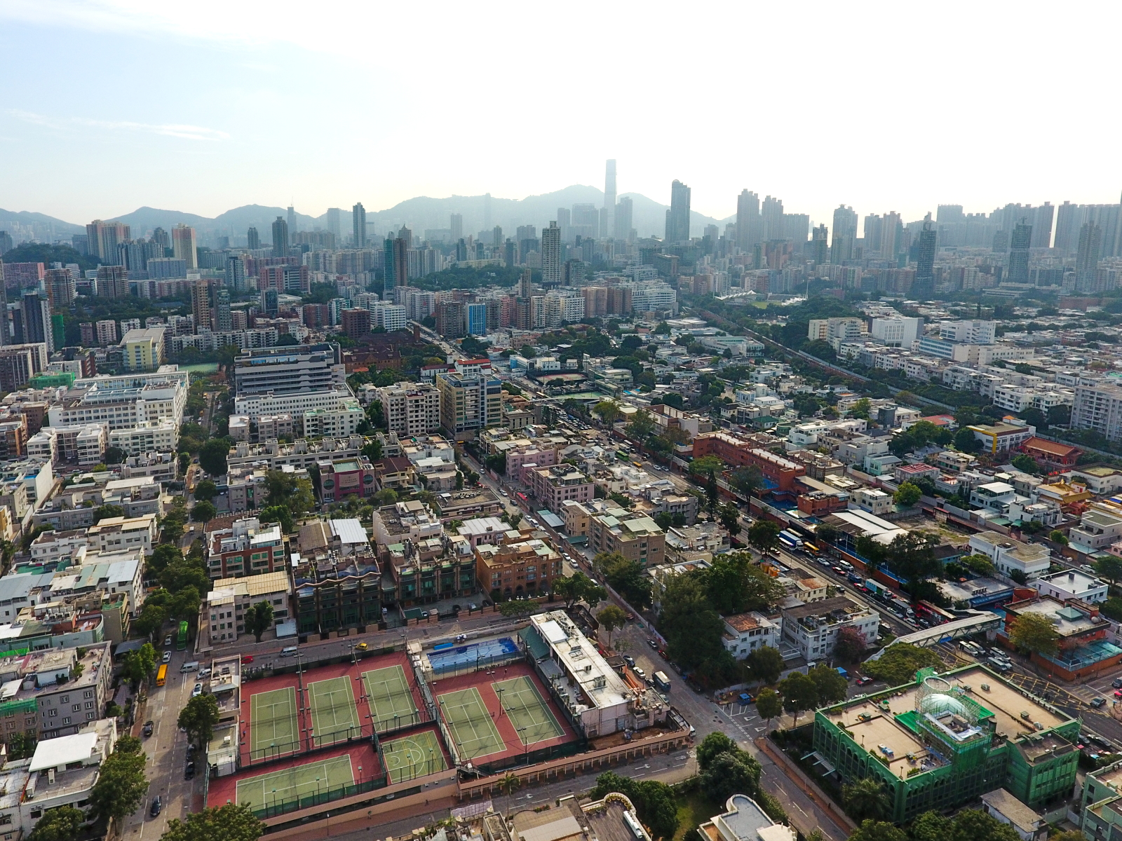 Kowloon Tong View